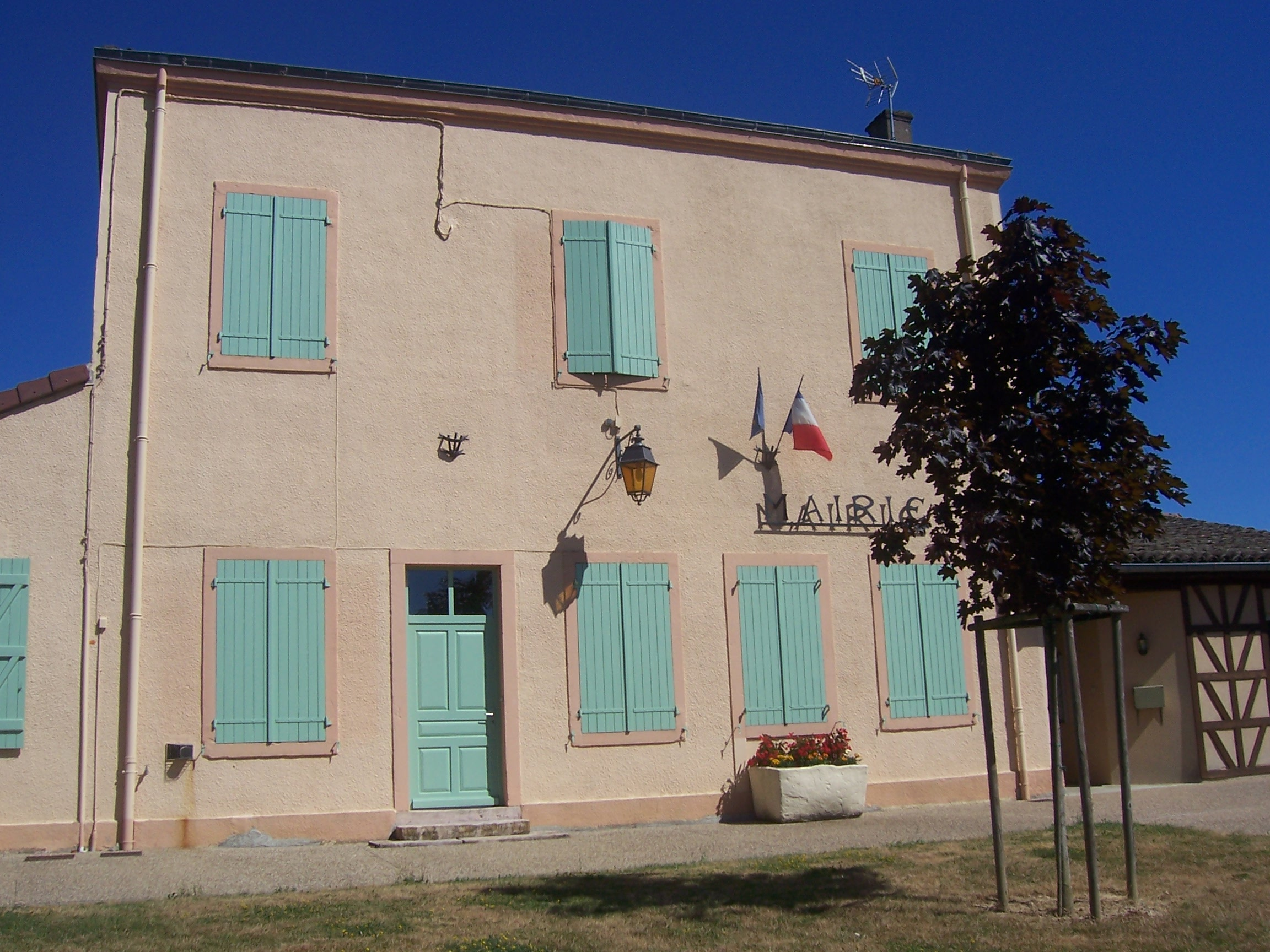 Mairie de La Genête